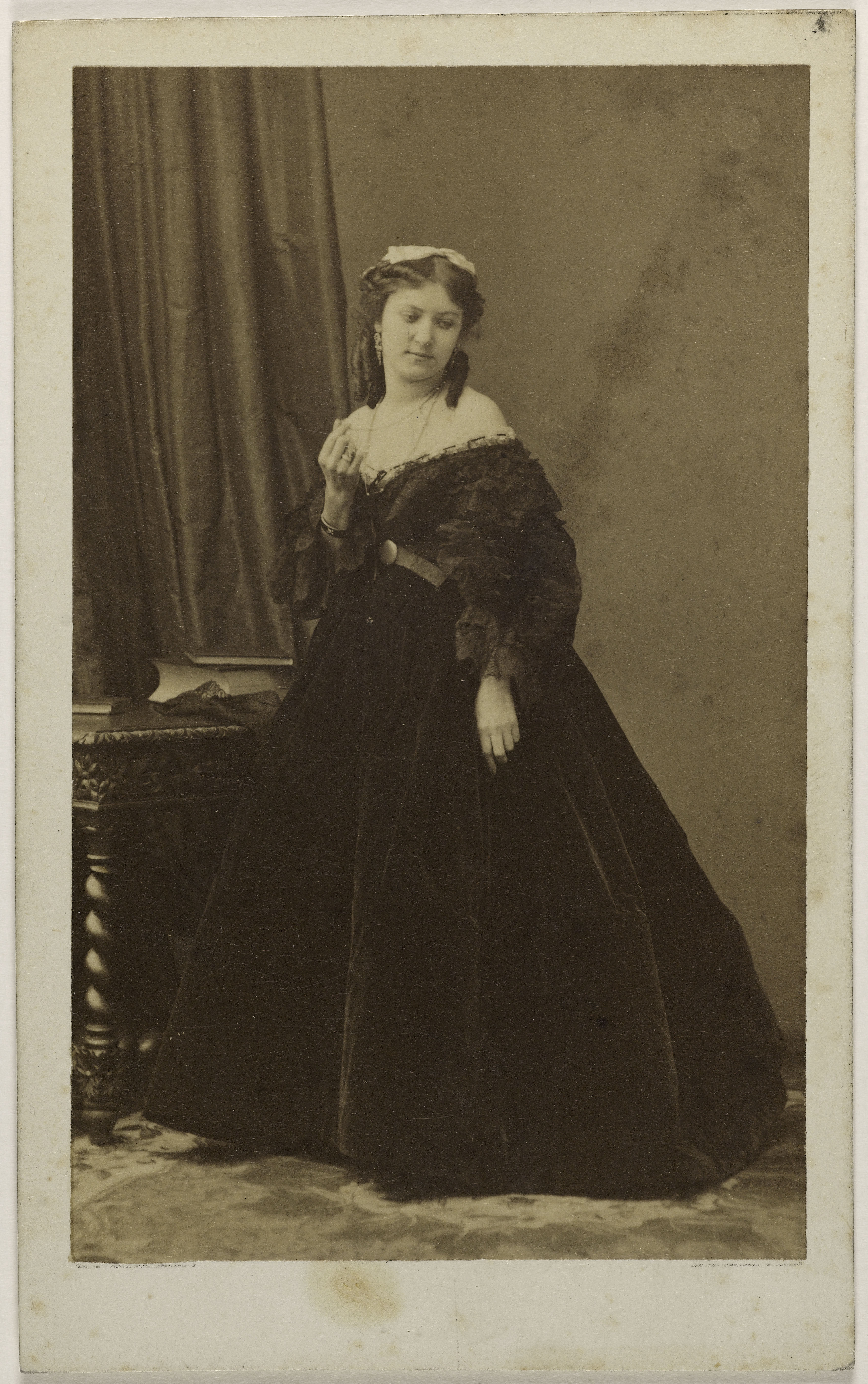 Portrait de Beau, Juliette, (comtesse Tyszkiewicz), (actrice). Carte de visite (recto). Photographie de Disdéri & Cie. Tiragesur papier albuminé. 1870-1890. Paris, musée Carnavalet.